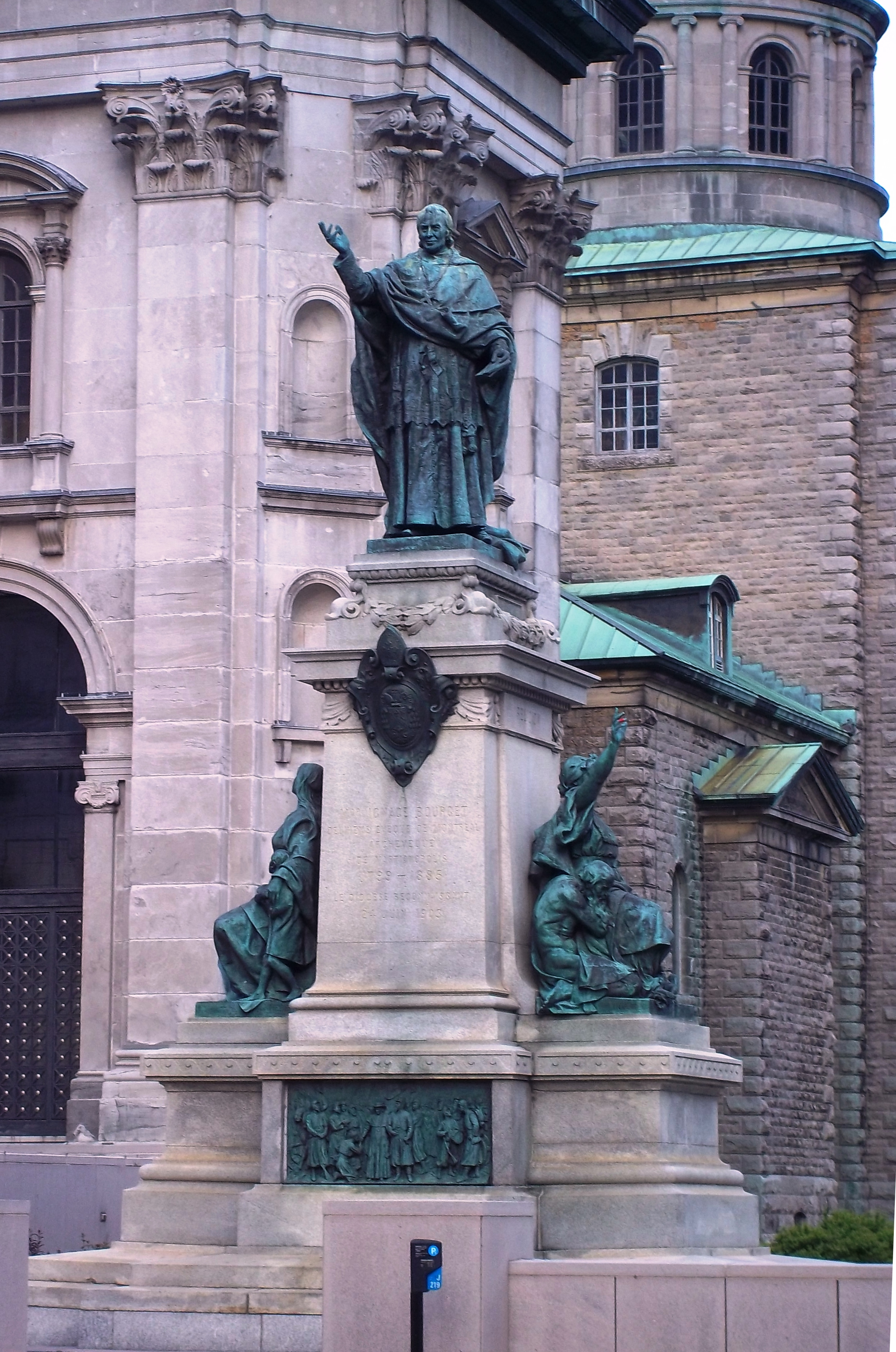 Monument à Ignace Bourget, situé devant la Basilique-cathédrale Marie-Reine-du-Monde, boulevard René-Lévesque Ouest, Montréal